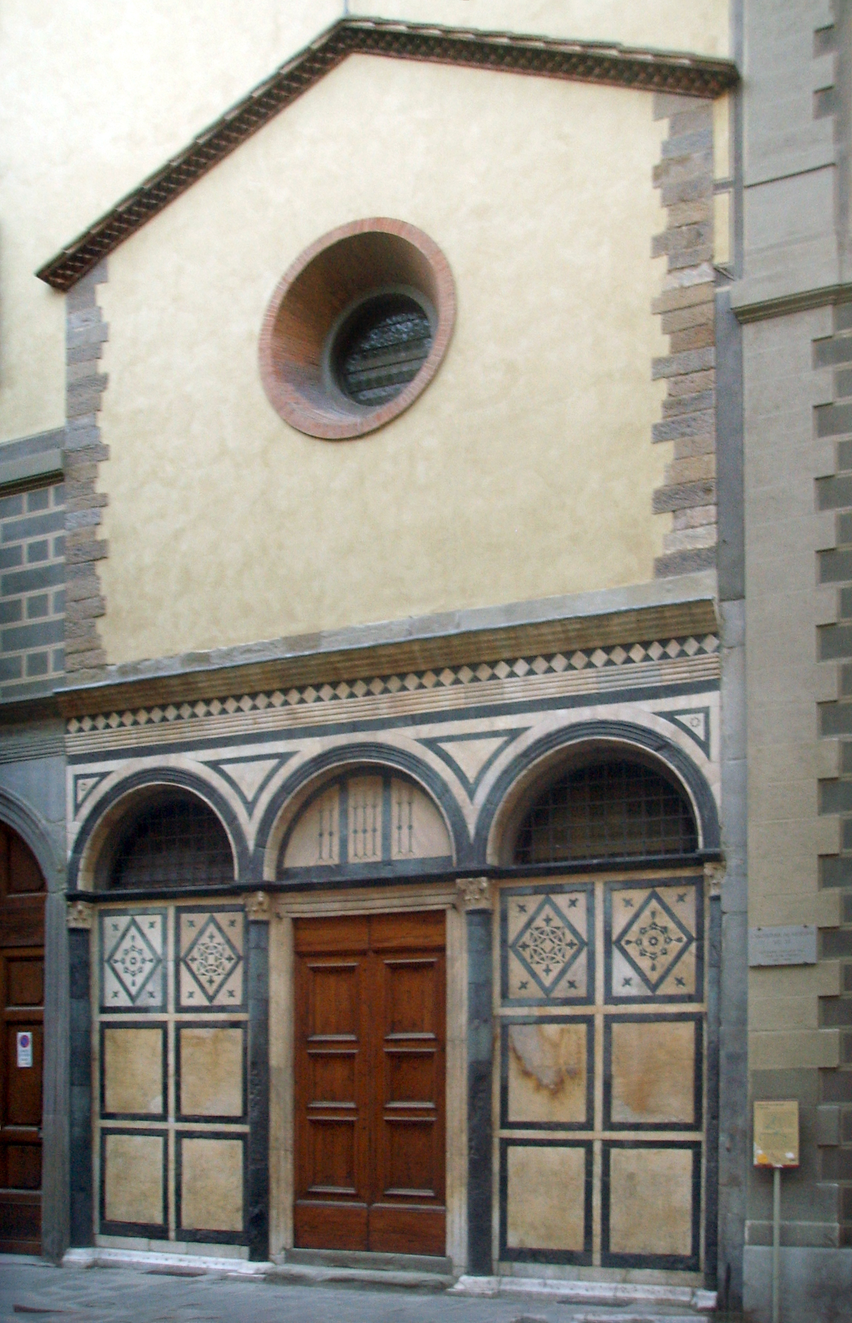 San Salvatore al Vescovo church